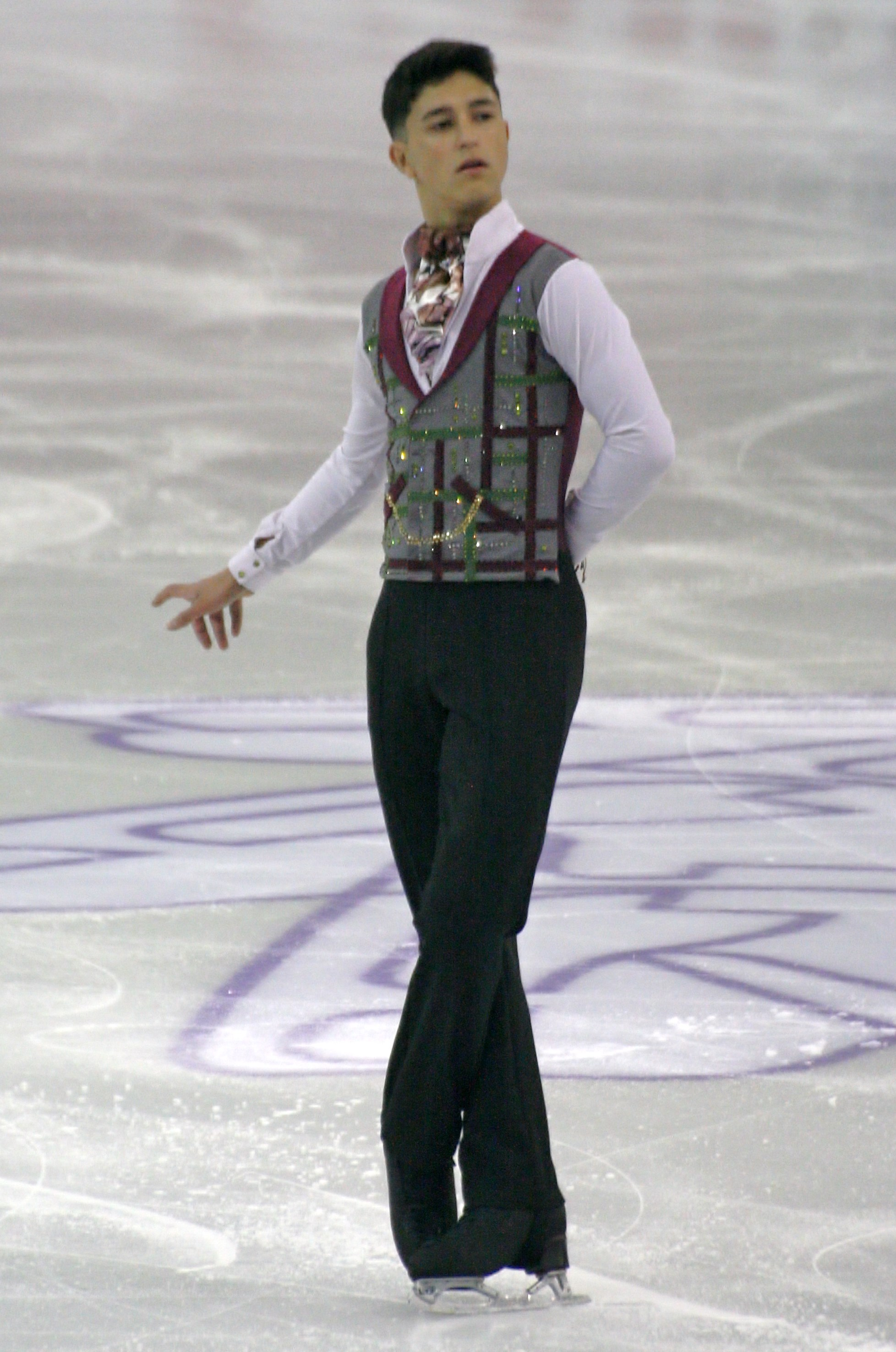 Даниэль Самохин (Израиль) на финале Гран-при по фигурному катанию среди юниоров 2015-2016.